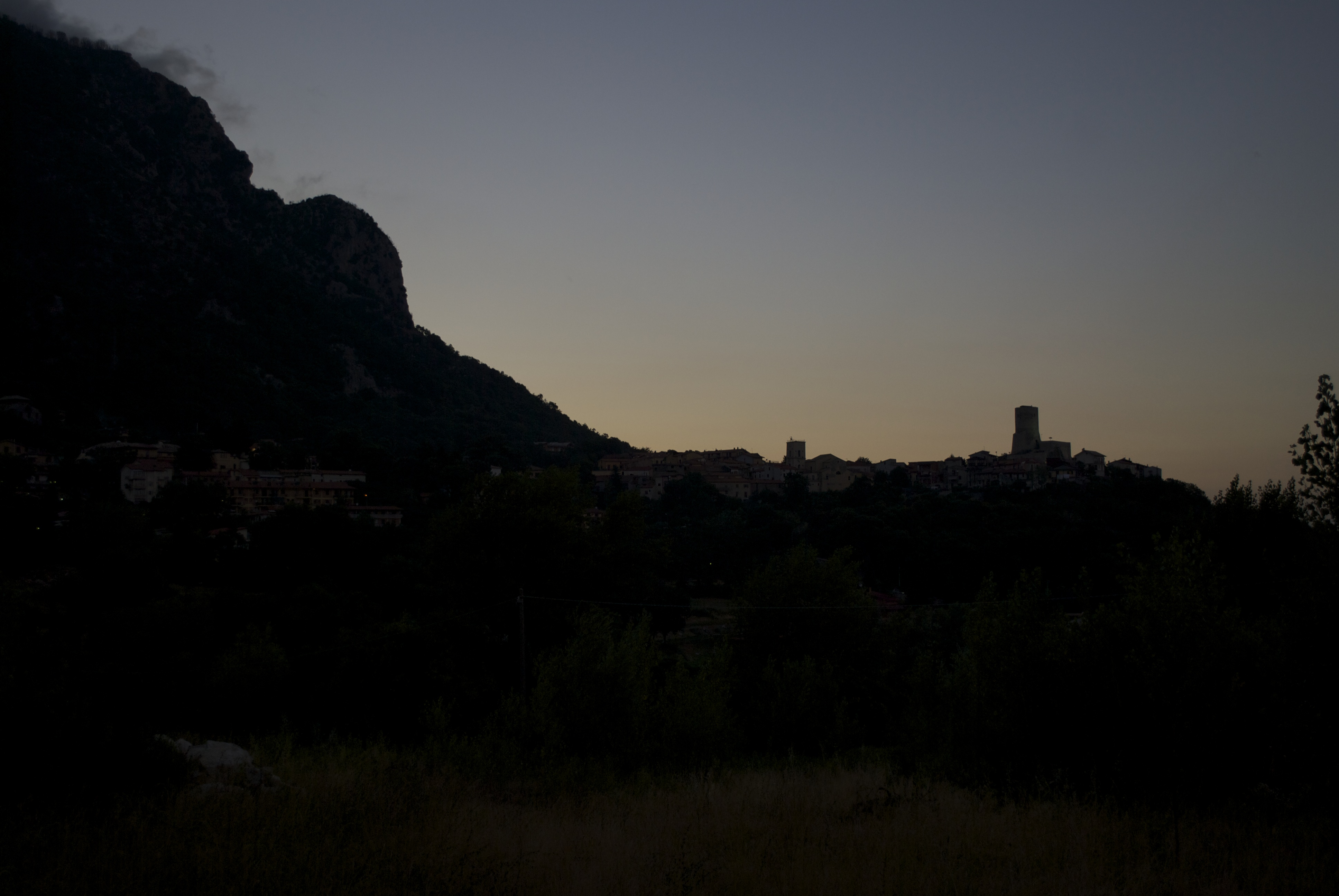 Foto di Summonte (AV) al tramonto